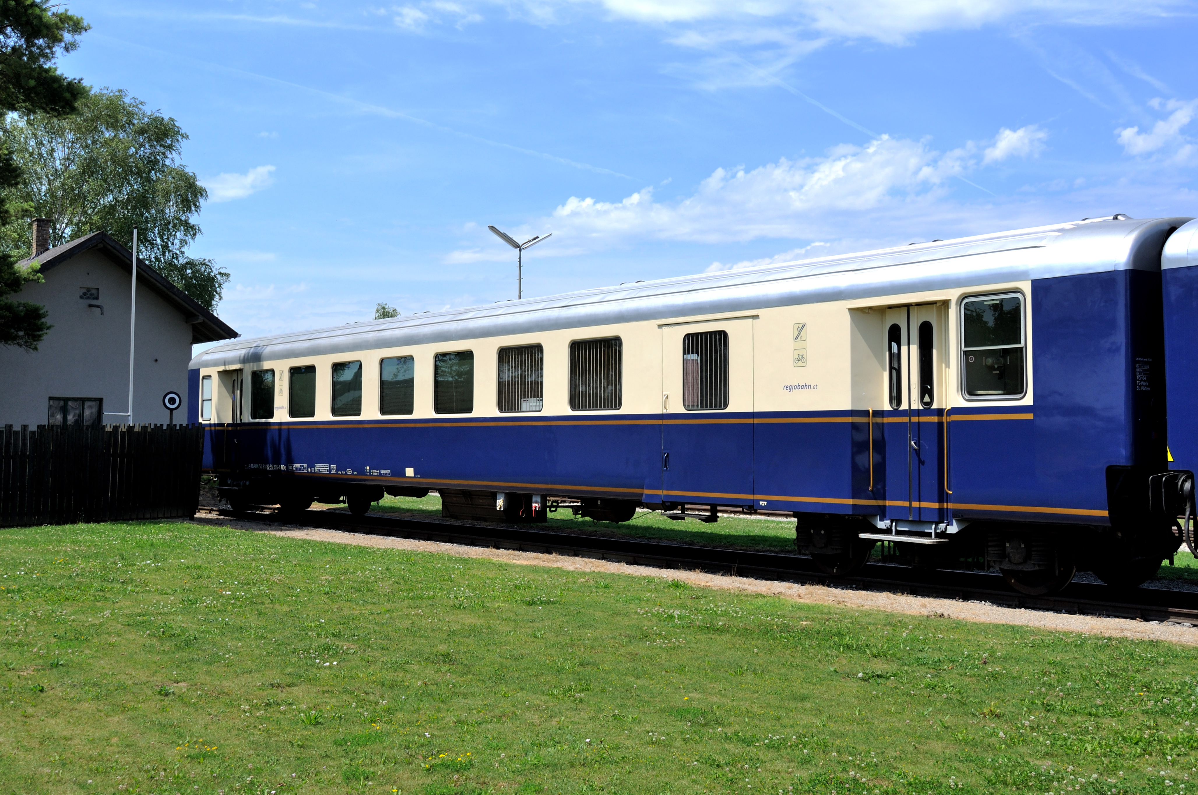 BDp 82-35 305-4 (Regiobahn-Lackierung) am Bahnhof Ernstbrunn